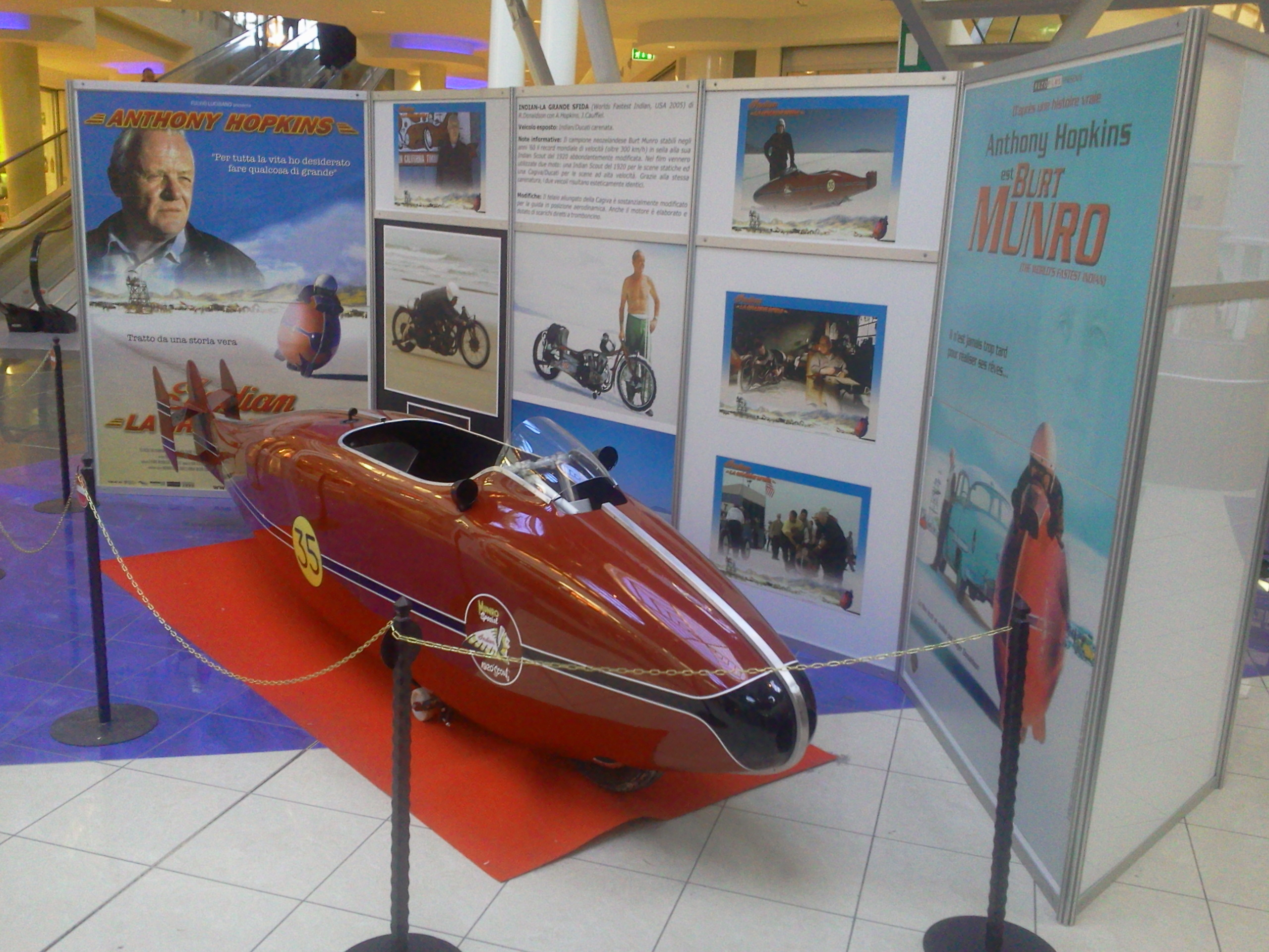 La moto utilizzata nel film "The world's Fastest Indian"